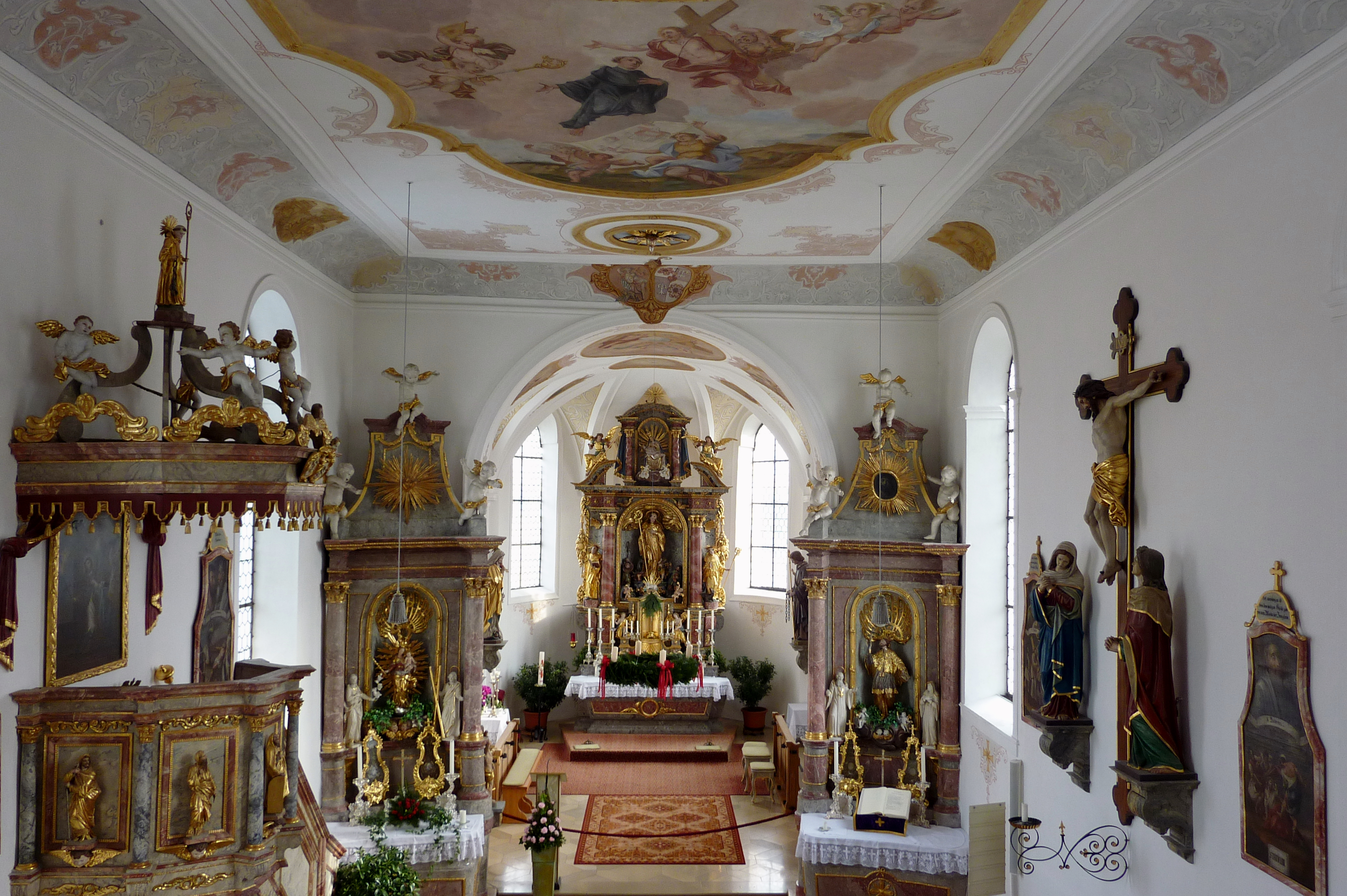 Katholische Pfarrkirche St. Leonhard in Baiershofen, einem Ortsteil der Gemeinde Altenmünster im Landkreis Augsburg (Bayern), Innenansicht mit Blick zum Chor